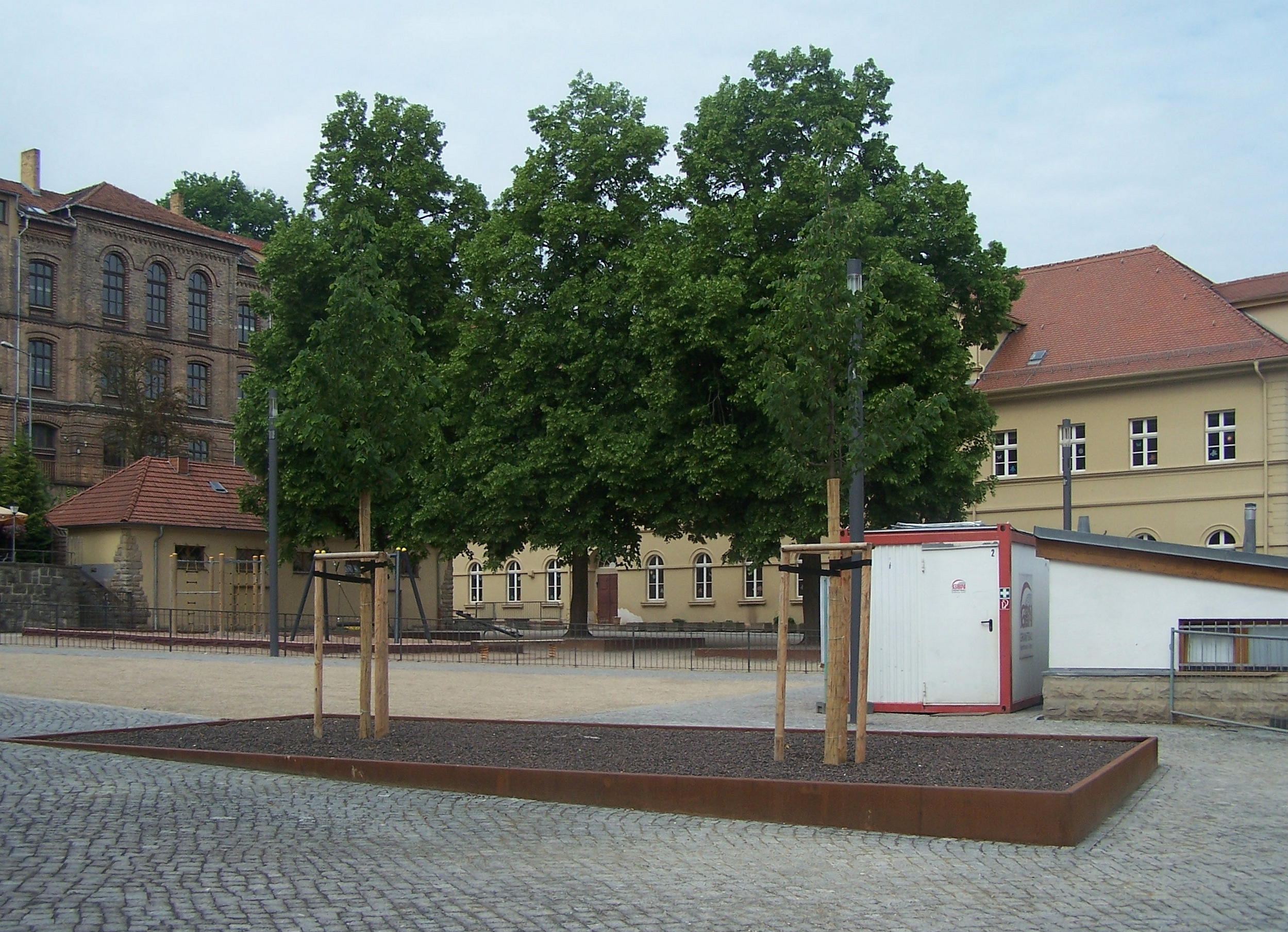 Die Eisenacher Esplanade nach Abschluß der Rekonstruktion im Juni 2016.